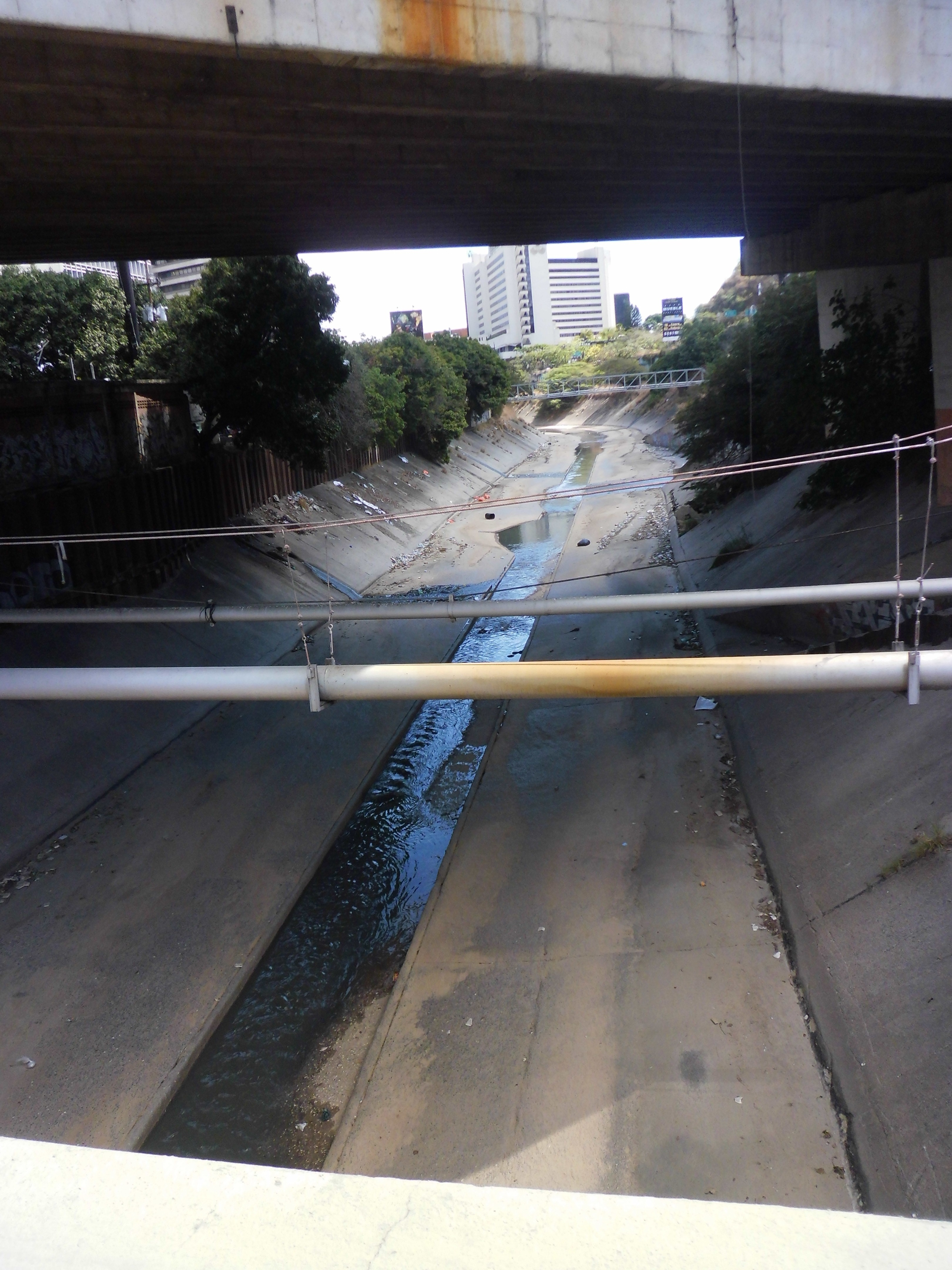 Río Guaire a nivel de Puente Veracruz, entre los municipios Chacao y Baruta del estado Miranda - Venezuela Nota: el curso del río Guaire reprimido por reparaciones en el embaulado del mismo (febrero 2013)